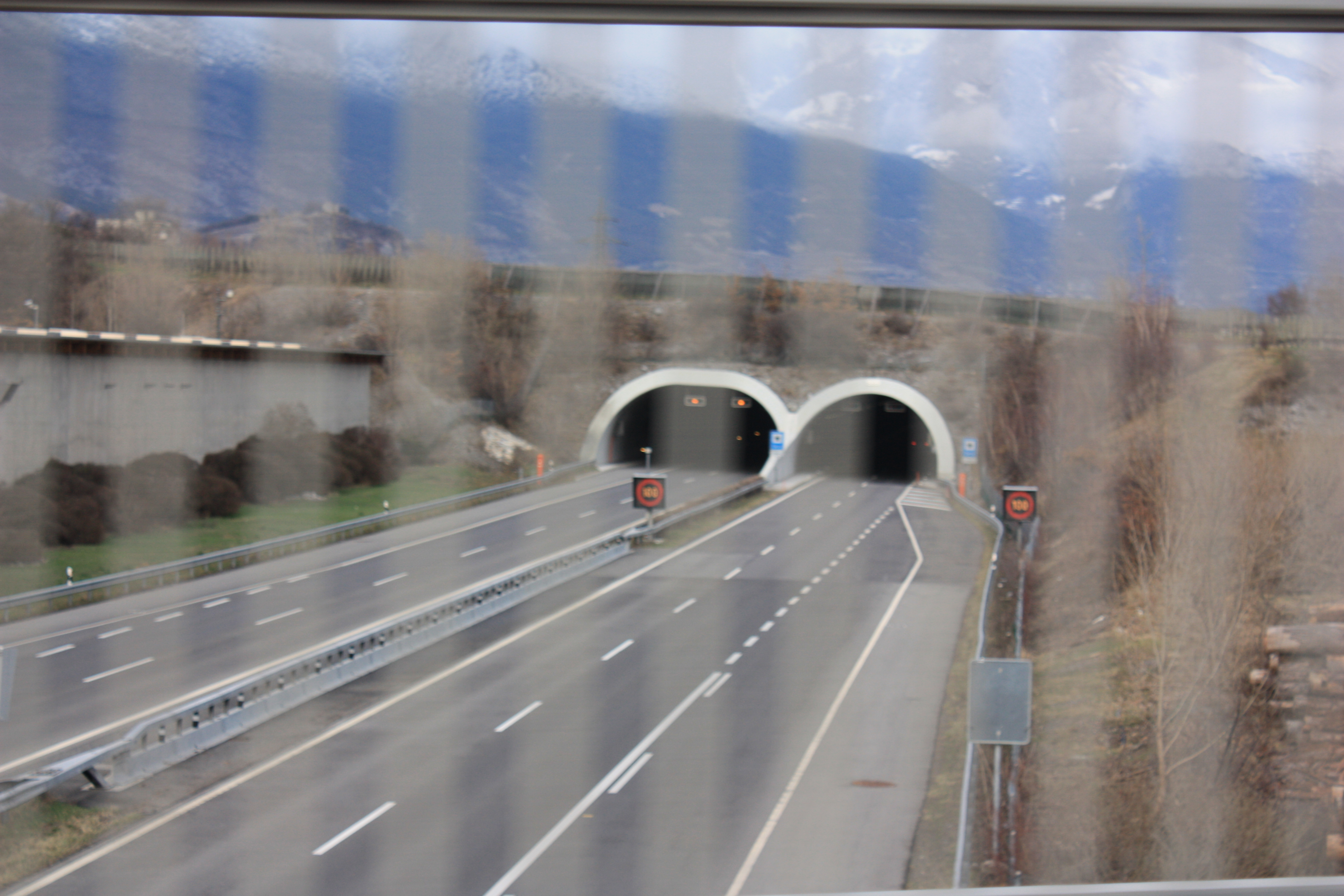 Vue de l'entrée (droite) et de la sortie (gauche) du tunnel de Sierre depuis le pont transversale situé au-dessus de la sortie d'autoroute Sierre Ouest.